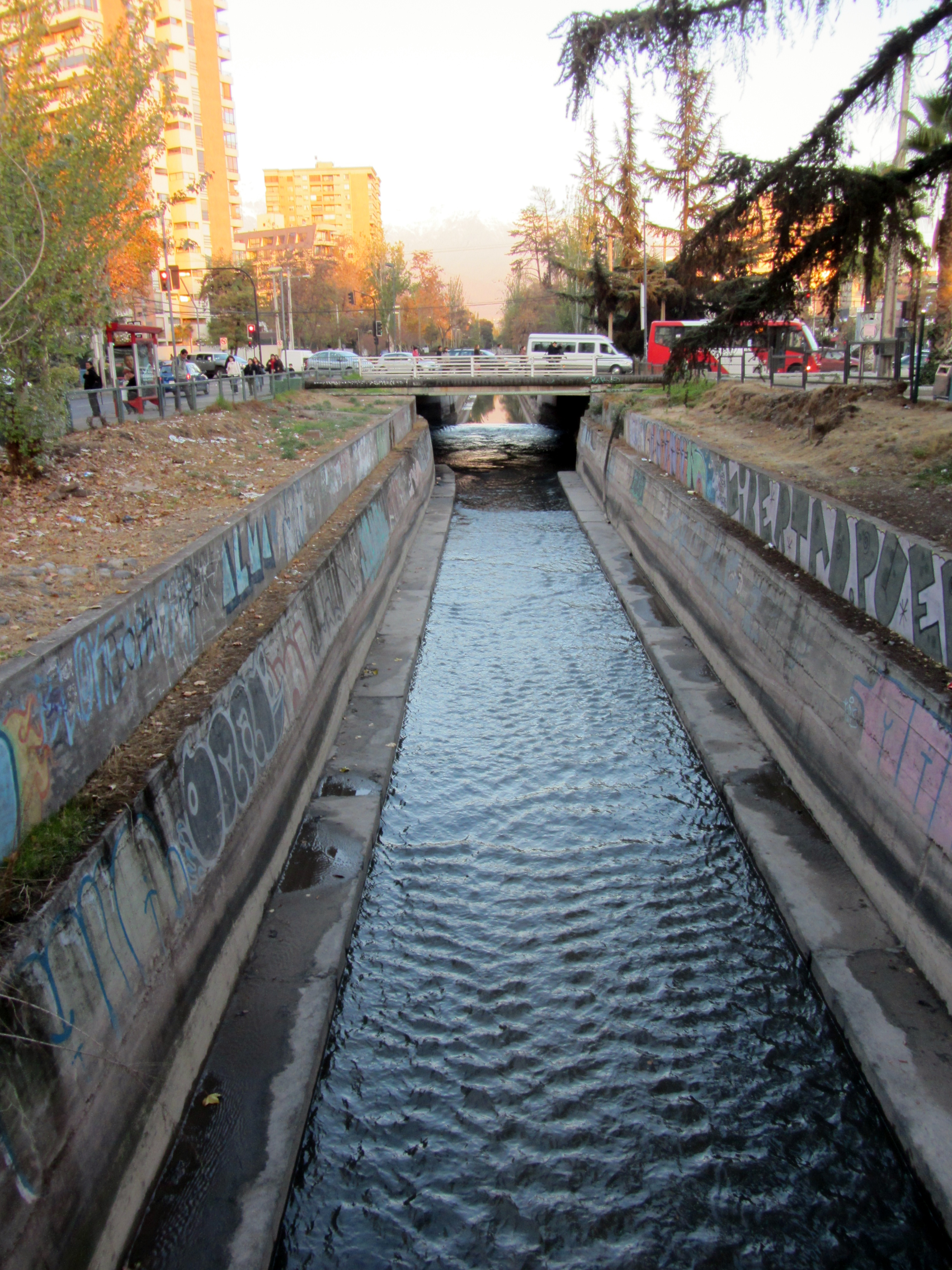 El canal San Carlos, Santiago de Chile. Foto tomada hacia la avenida Colón.